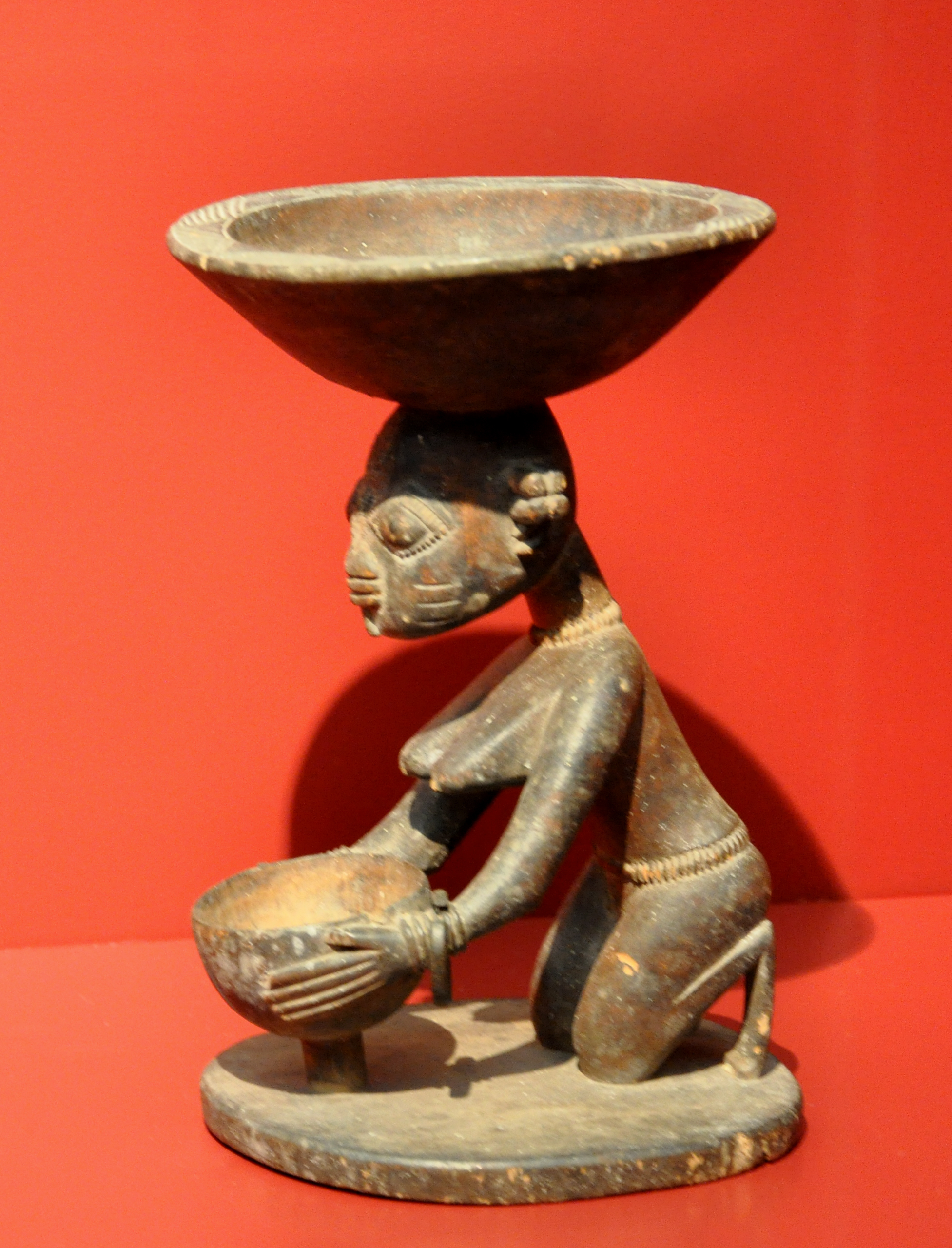 Orakelschale agere ifa, Nigeria, Yoruba-Werkstatt der südlichen Ekiti-Region, 19./frühes 20. Jahrhundert; Holz, Eisenring Museum Rietberg, Zürich; Inv. Nr. RAF 652